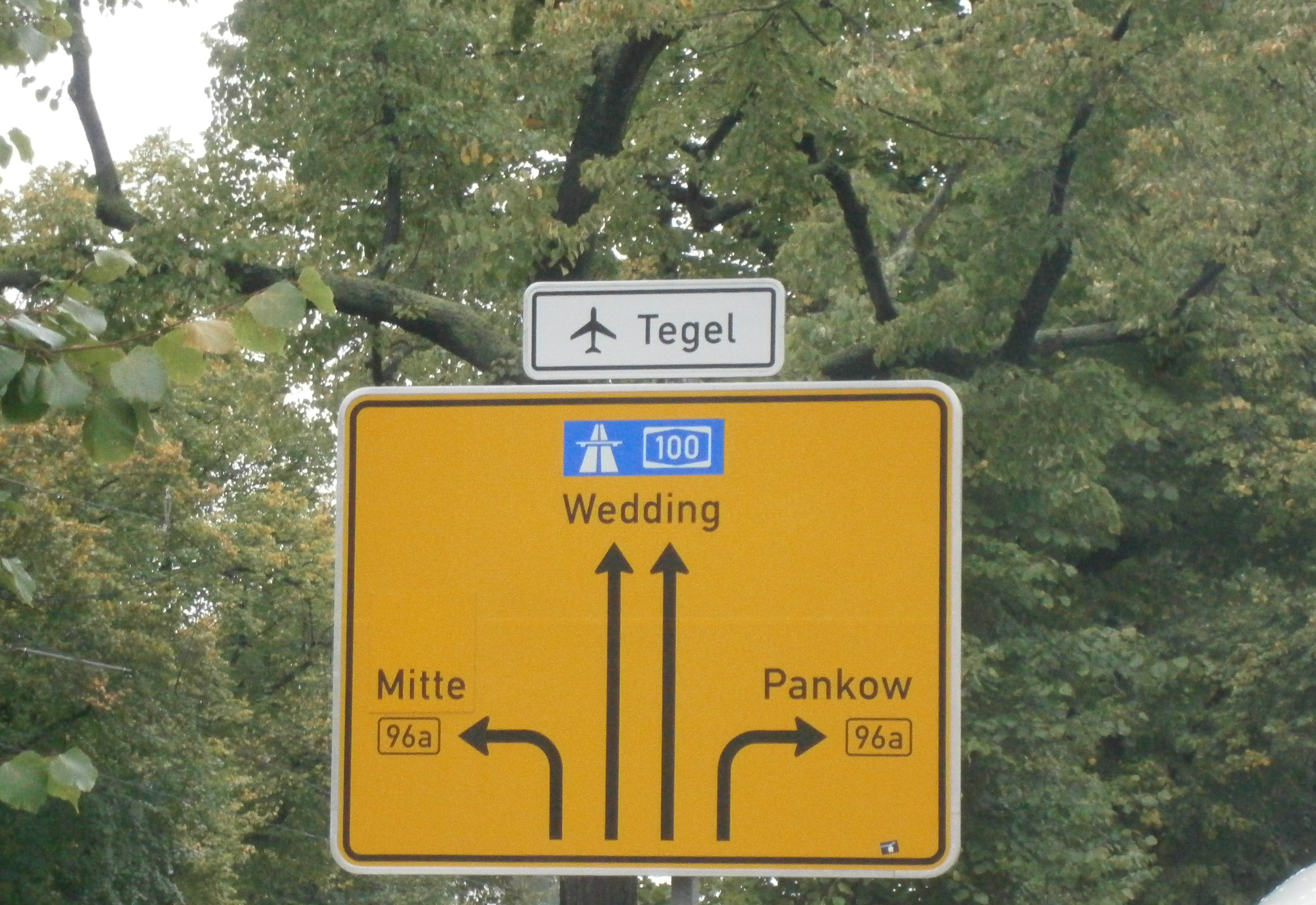 Hinweissschild auf B 96a vor der Schönhauser Allee aus der Wisbyer Straße heraus